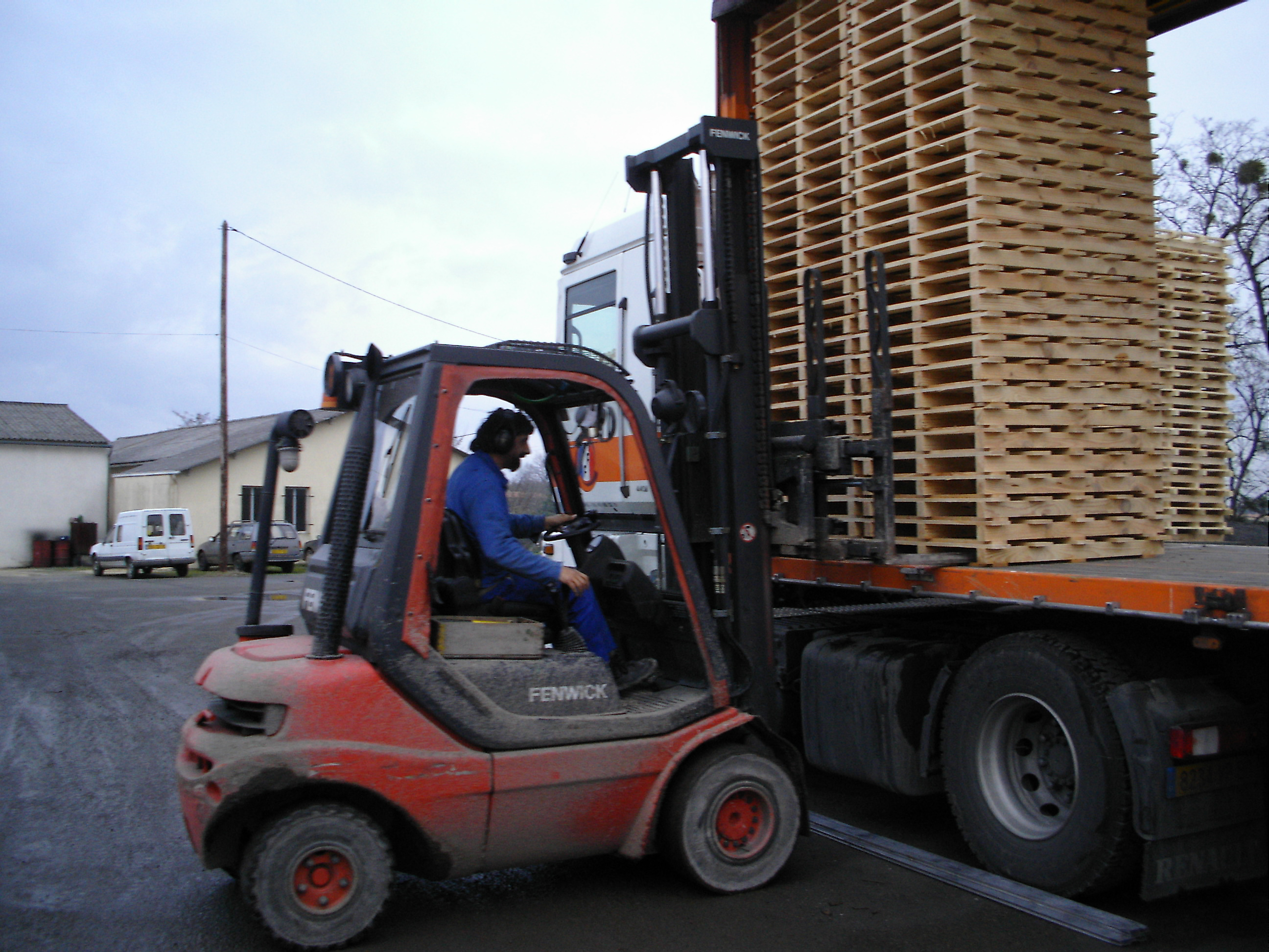 chariot élévateur Fenwick